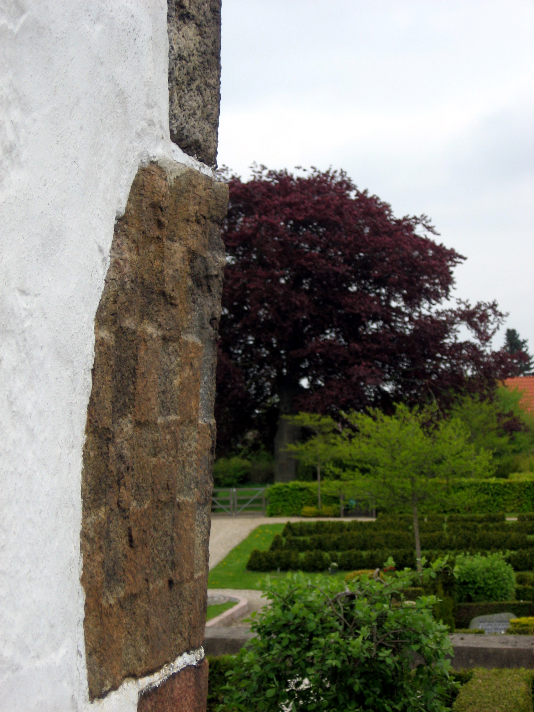 Tilst Kirke in Tilst Sogn, Århus Kommune, Denmark.